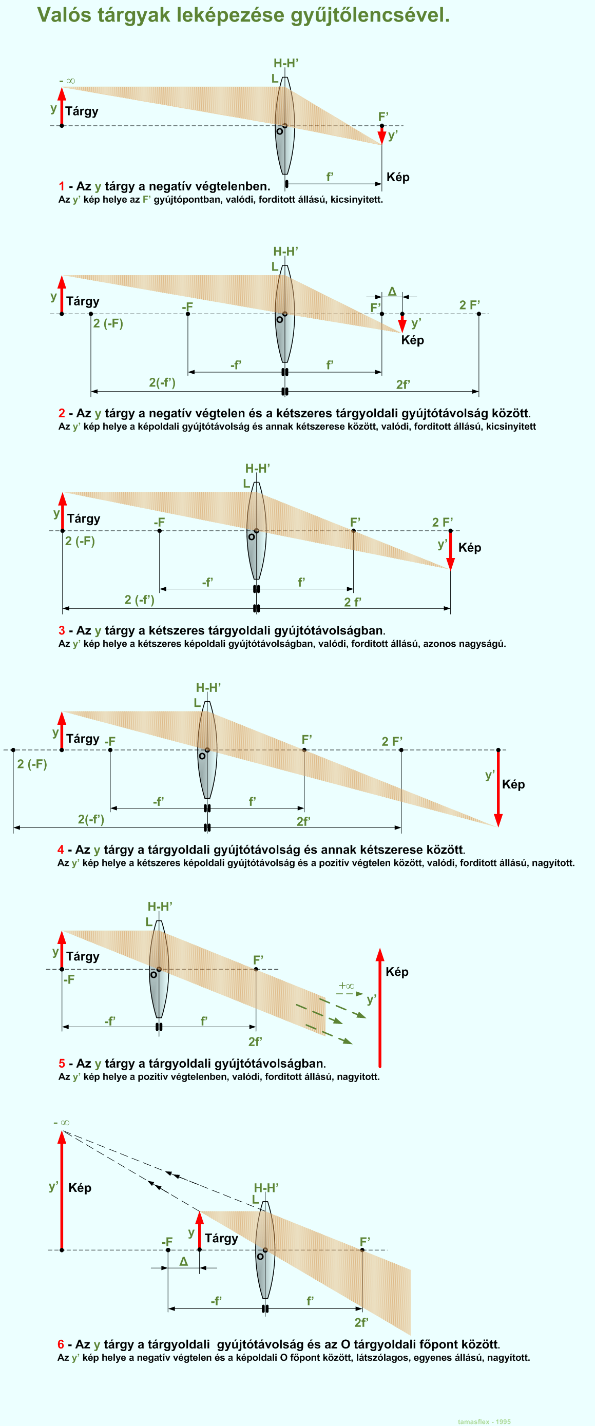 Valós tárgyak leképezése gyűjtőlencsével